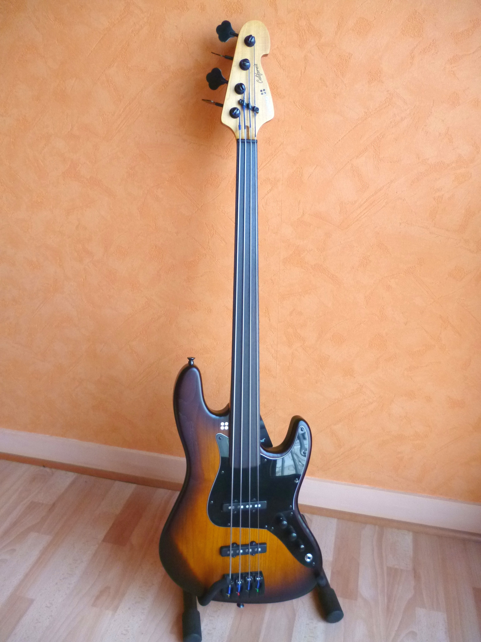 Basse fretless Sandberg California 4 cordes